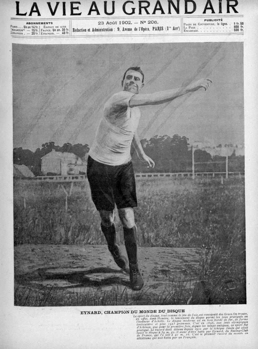 La Vie au grand air n°206, 23 août 1902.